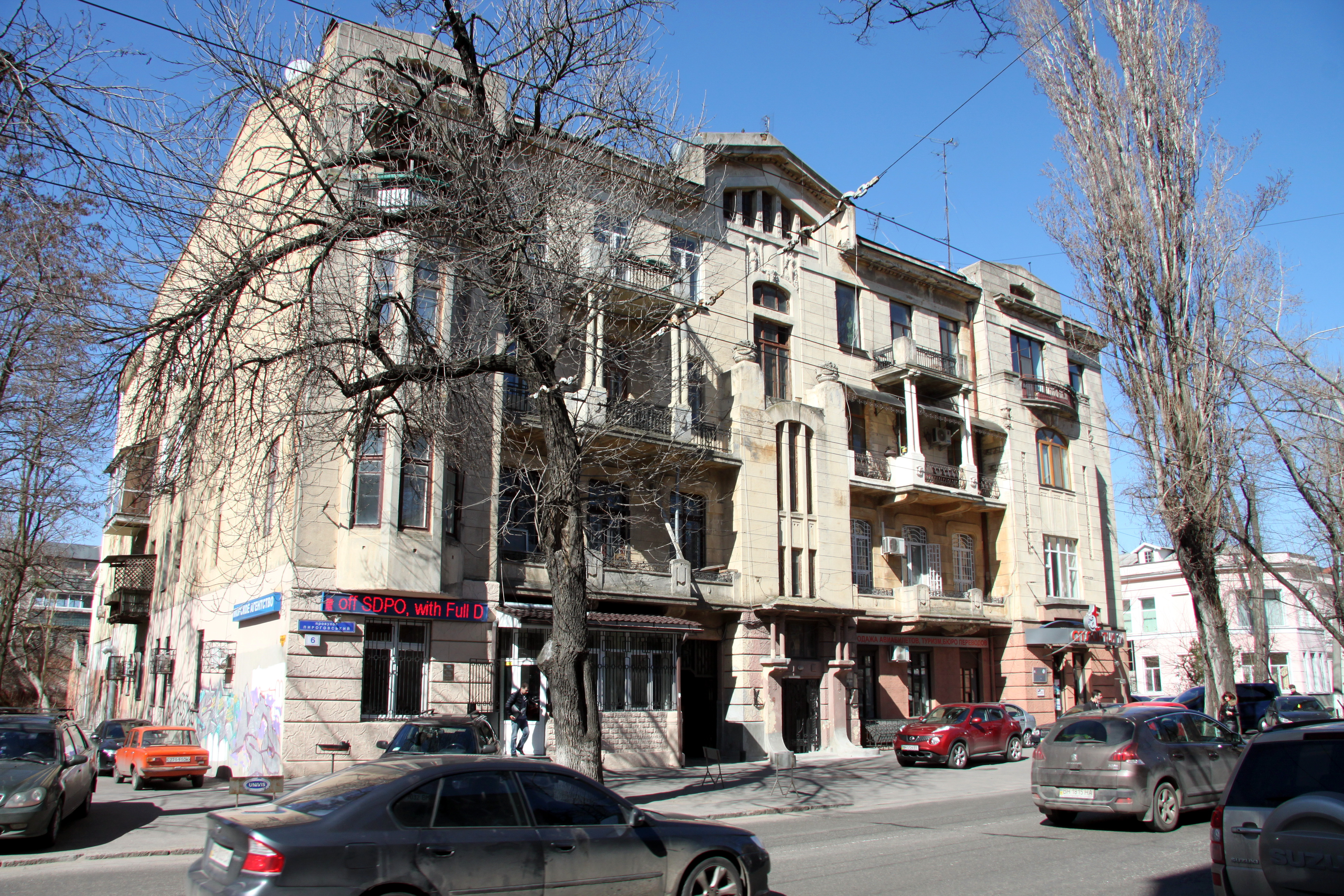 Будинок прибутковий Раухвергера, Пироговський пров., 6, Одеса